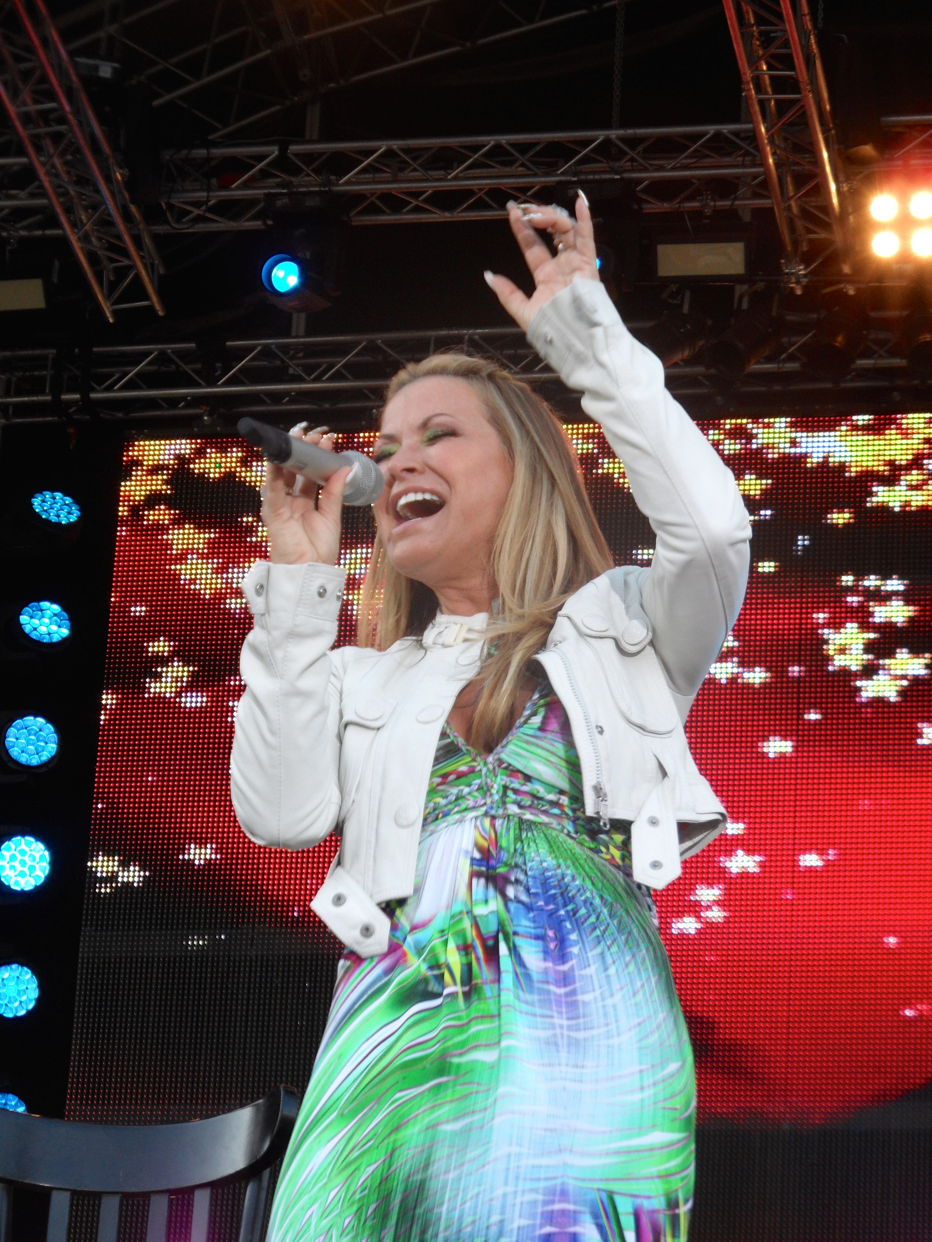 Anastacia bei stars@nrd2 in Vechta